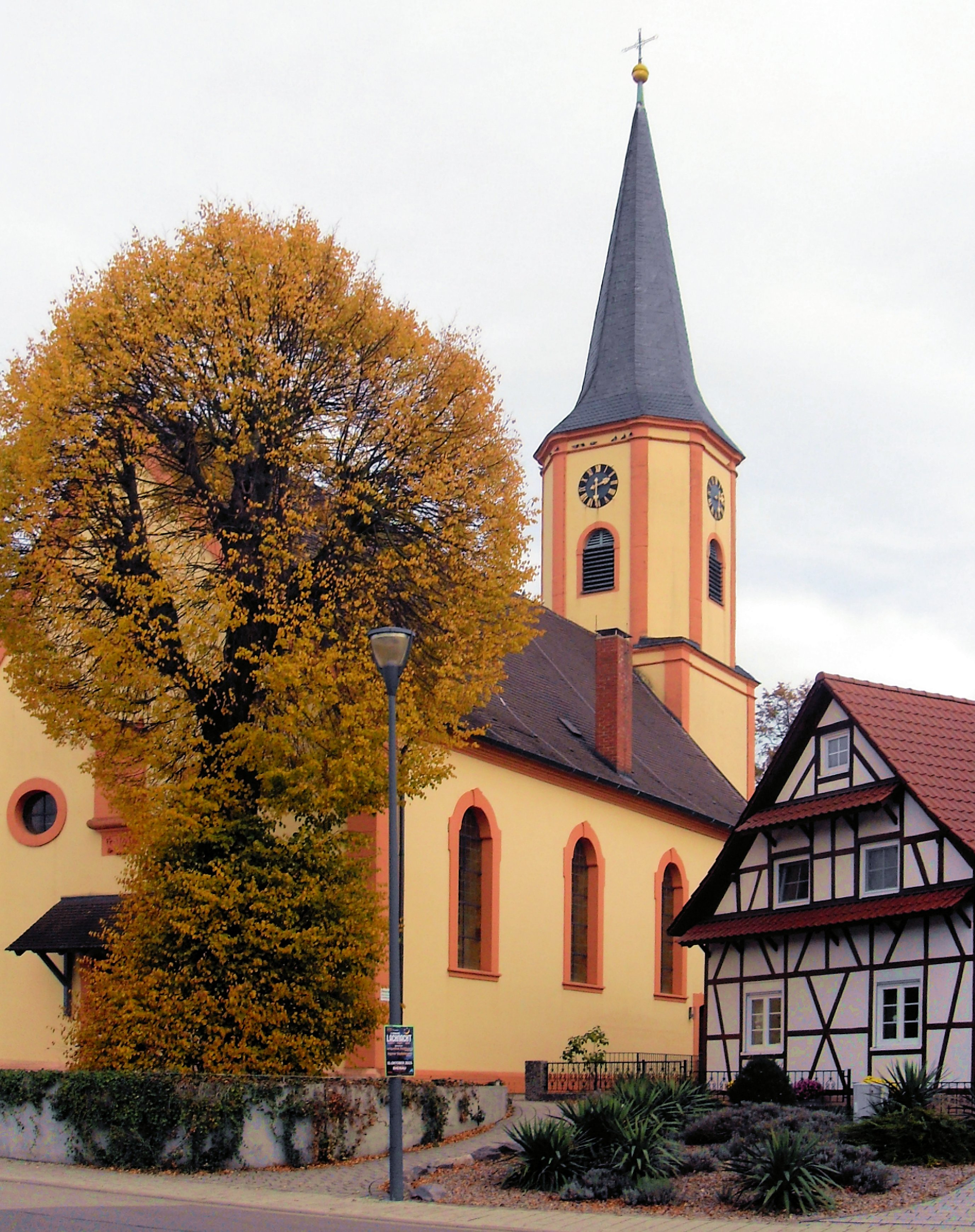 Kirche St. Georg in Freistett, Stadt Rheinau, Ortenaukreis